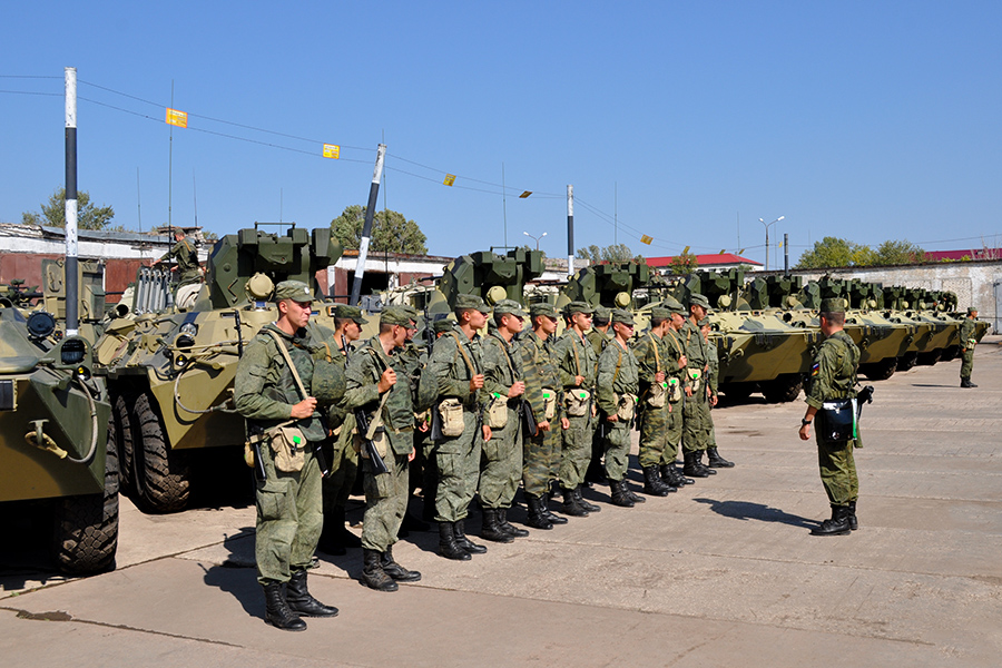 Приведение в полную степень боевой готовности 23-й отдельной гвардейской мотострелковой бригады ЦВО, задействованной во внезапной проверке боеготовности (г. Самара)